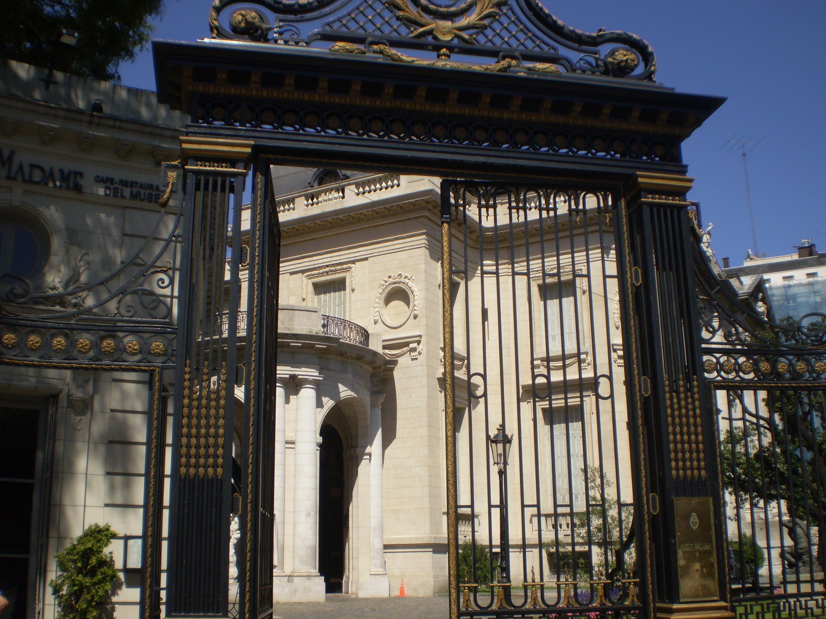 Museo Nacional de Arte Decorativo, Buenos Aires, Argentina